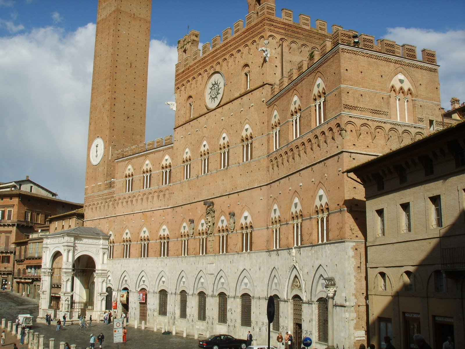 Palazzo Pubblico (Siena), Italy